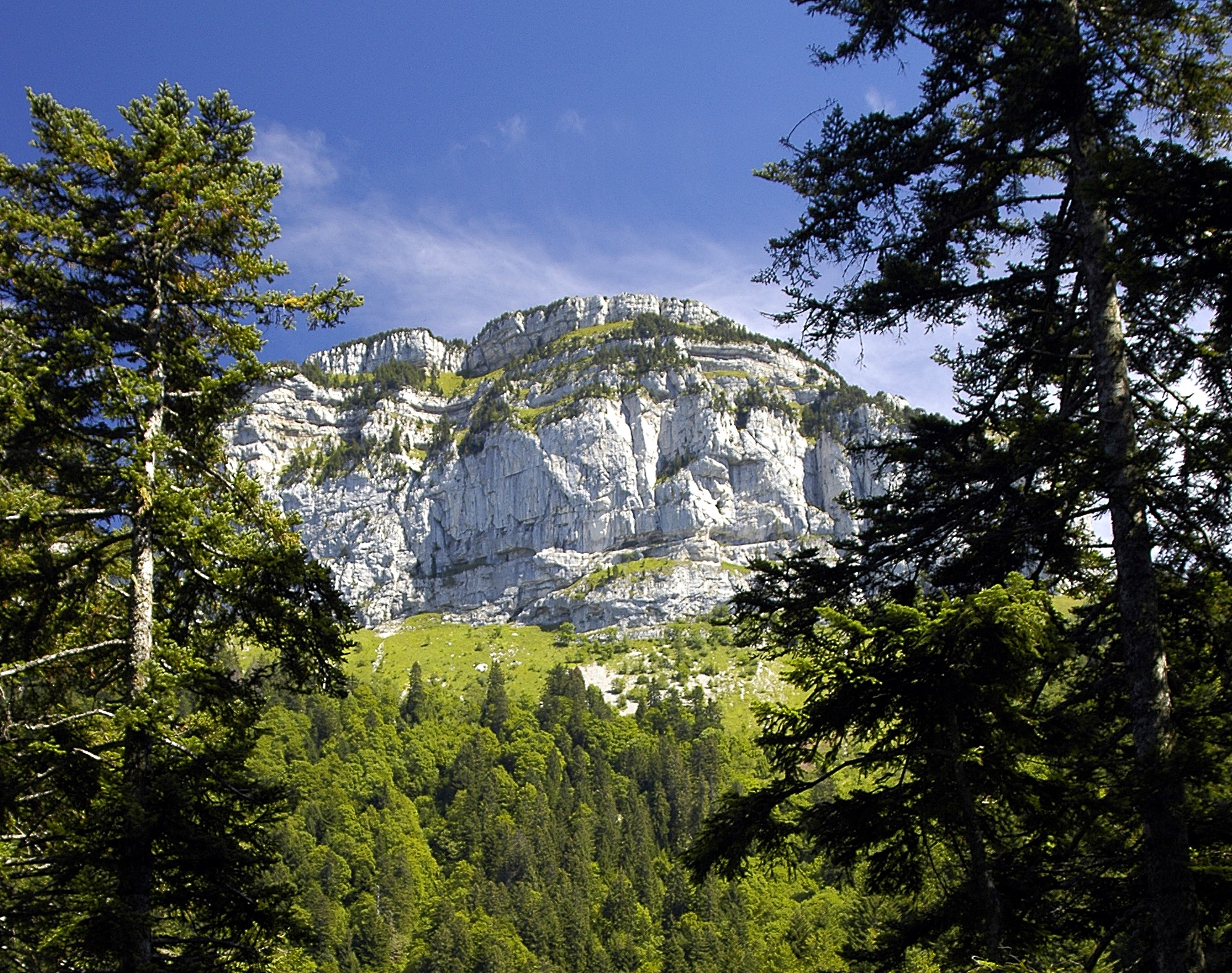 Une vue de la falaise supportant le plateau du Parmelan.